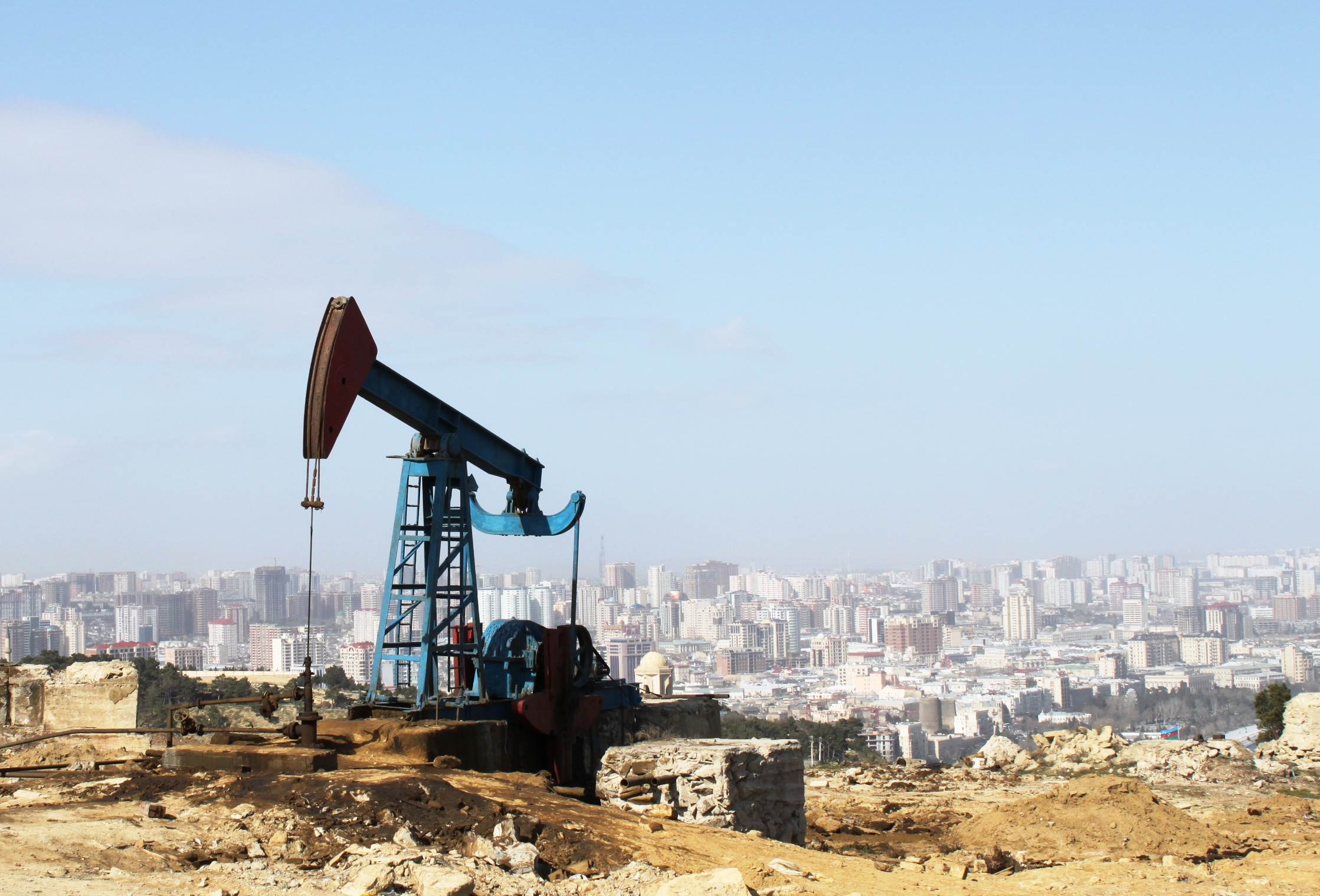 Станок-качалка для механической добычи нефти штанговыми глубинными насосами.